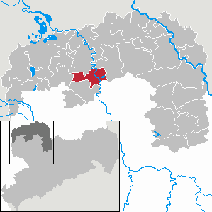 Eilenburg in Saxony - Landkreis Nordsachsen